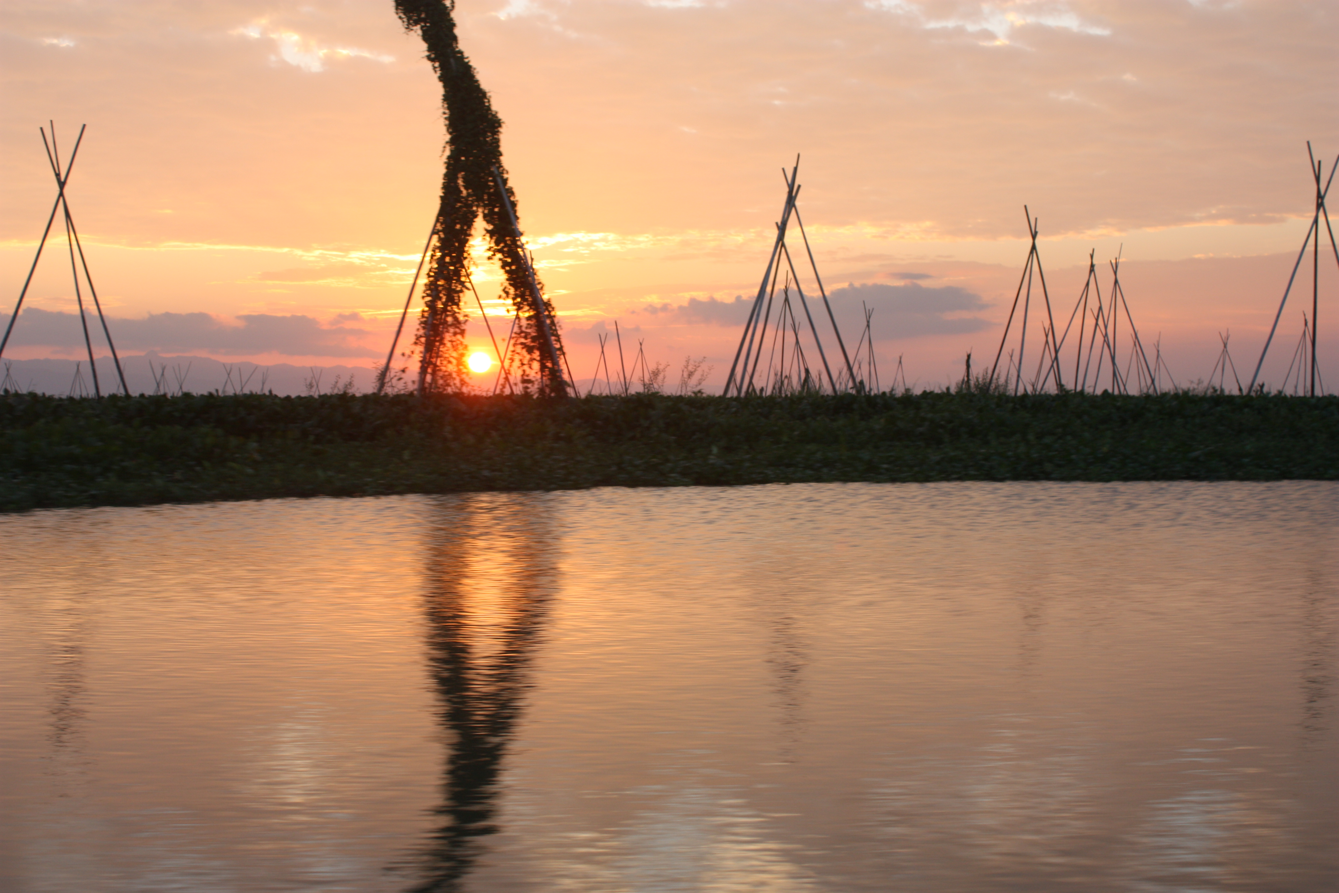 Sengkang, Danau Tempe